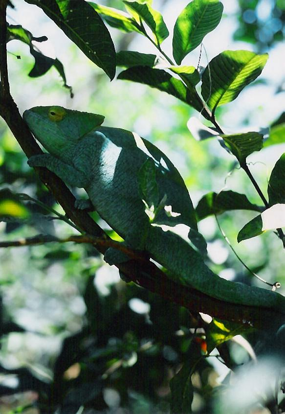 Caméléon de Parson (Calumma parsonii) , Réserve de Périnet